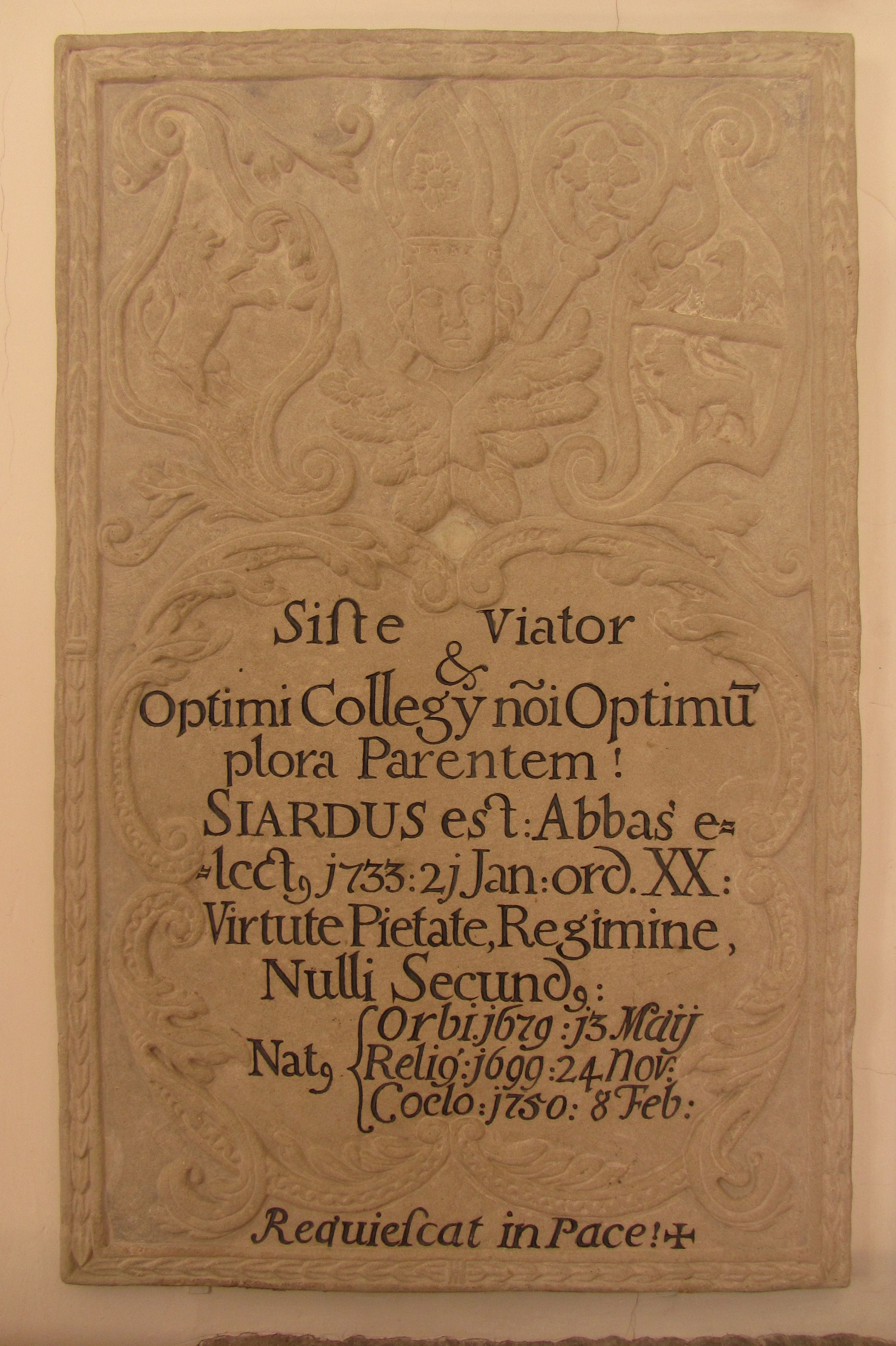 Epitaph des Schussenrieder Abtes Siard Frick